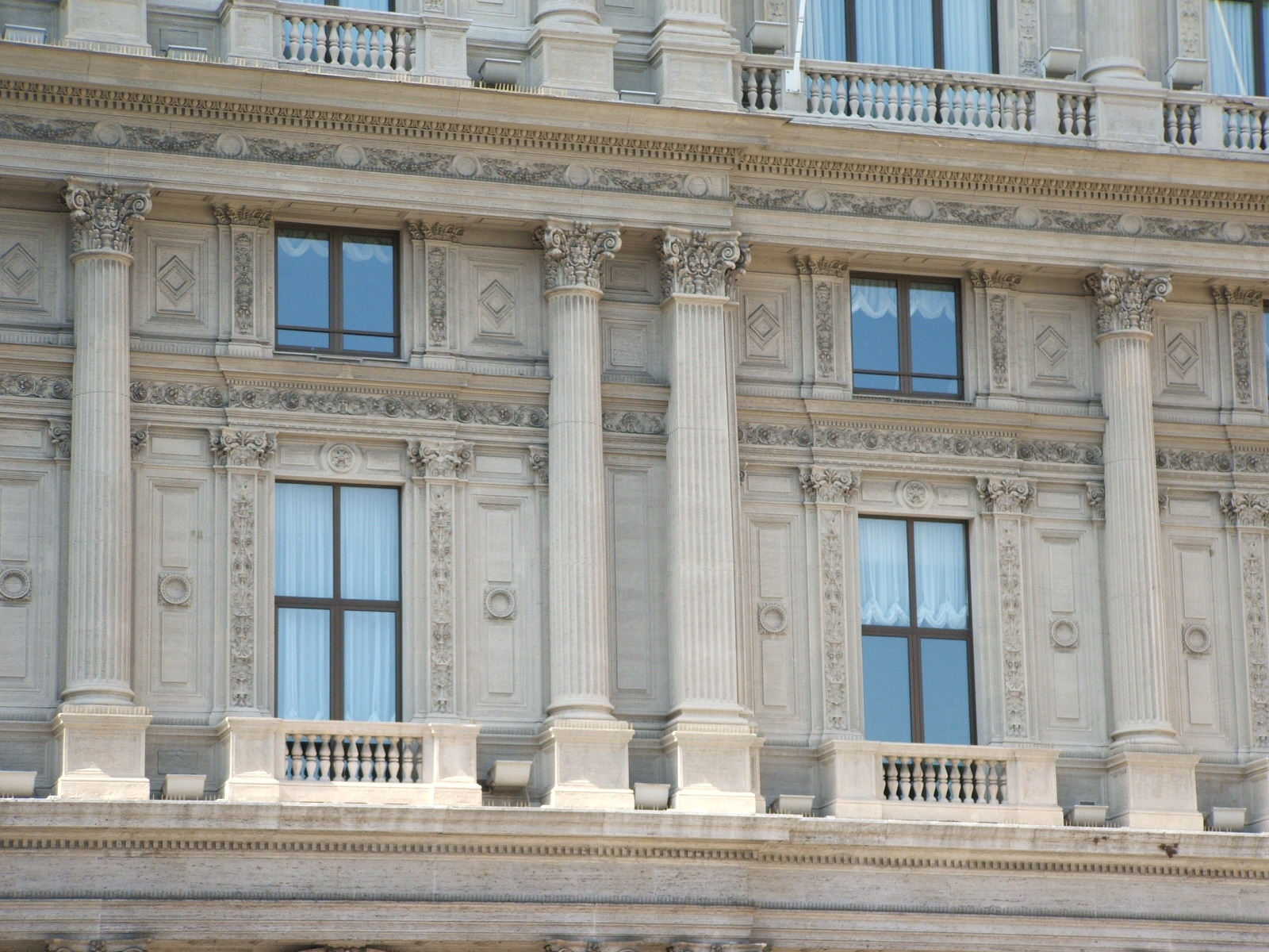 Immagine dalla città di Genova Particolare del Palazzo della Regione a piazza De Ferrari